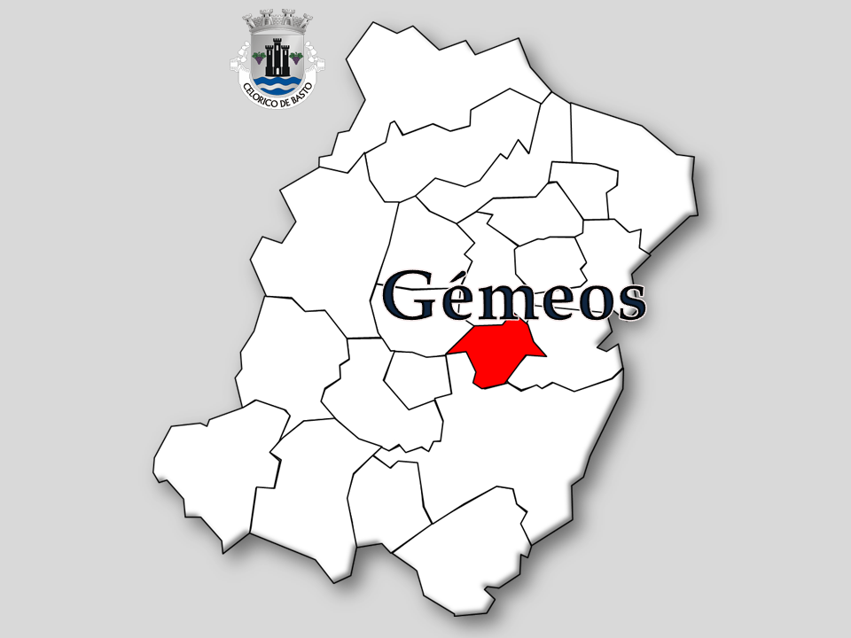 Censos 1864/2011